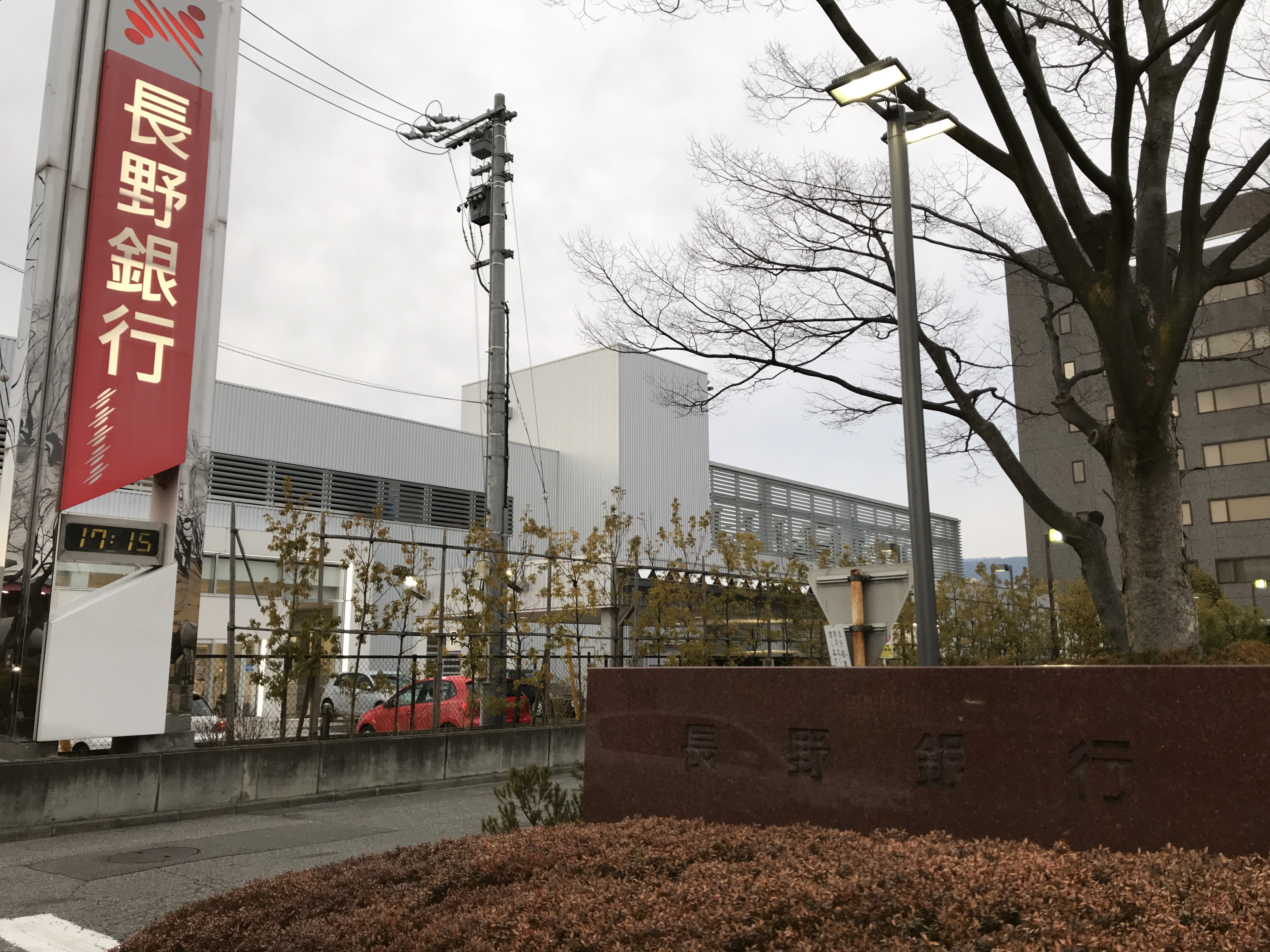 長野銀行本社、入り口看板。